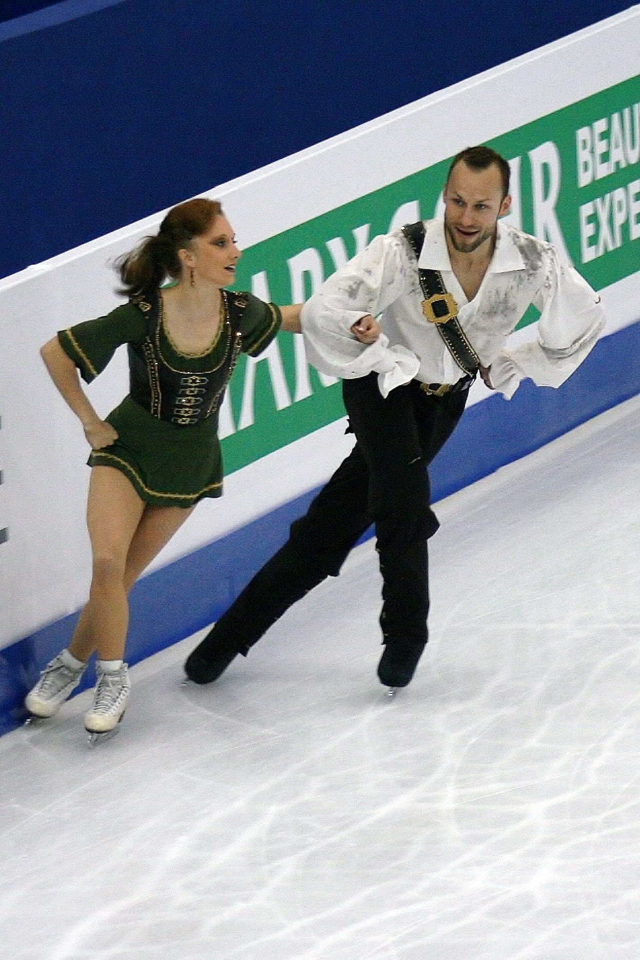 Мэйлин Хауши Даниэль Венде (Германия) на чемпионате мира по фигурному катанию 2012